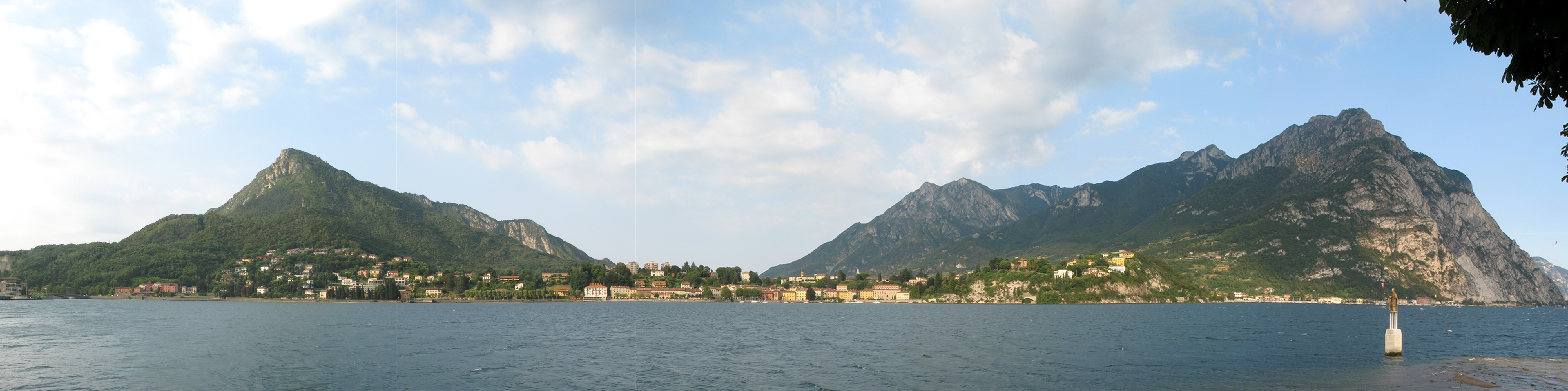 Panorama di Malgrate da Lecco